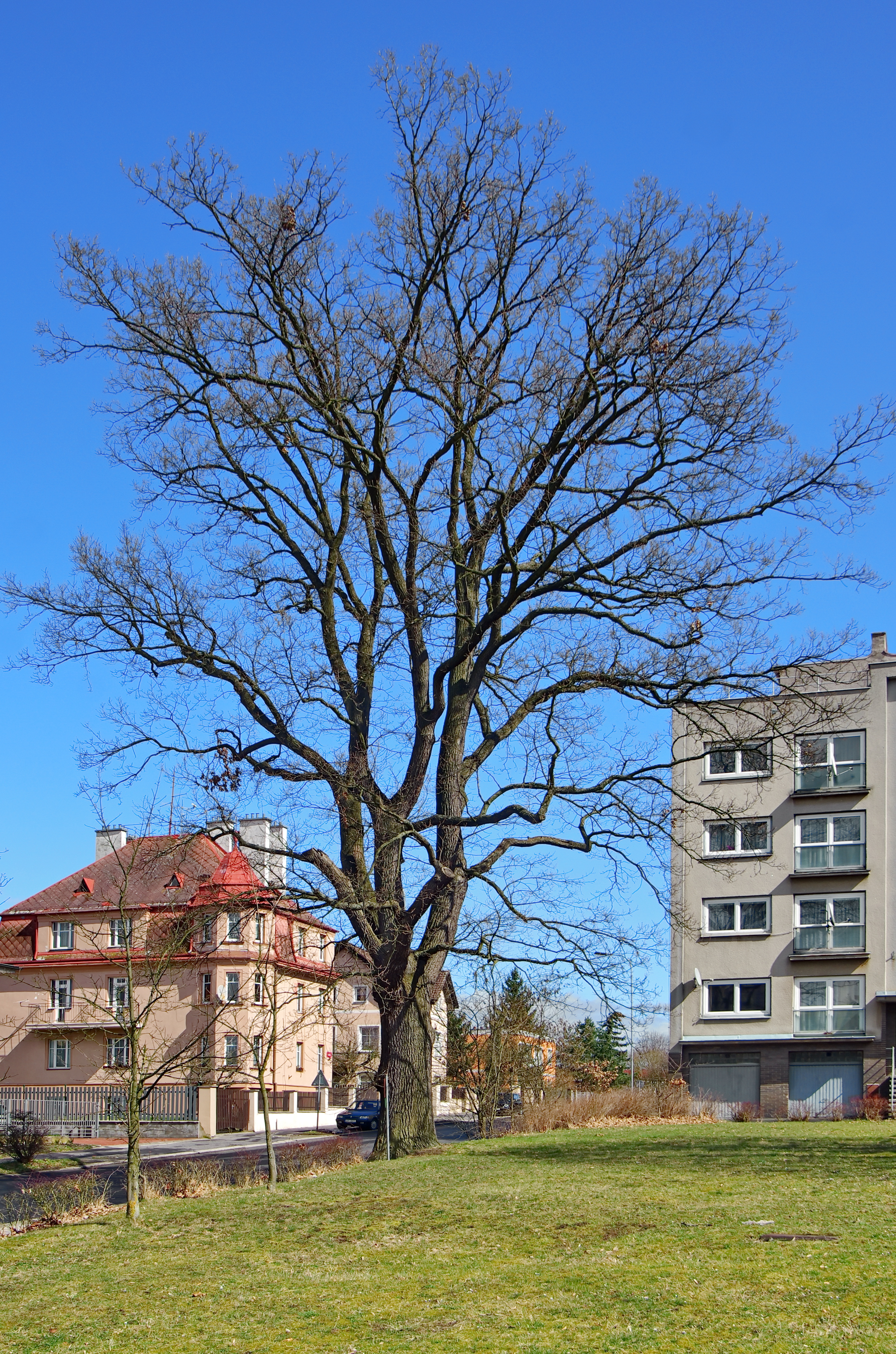 památný strom - Dub Moudrosti - v Karlových Varech, čtvrť Drahovice